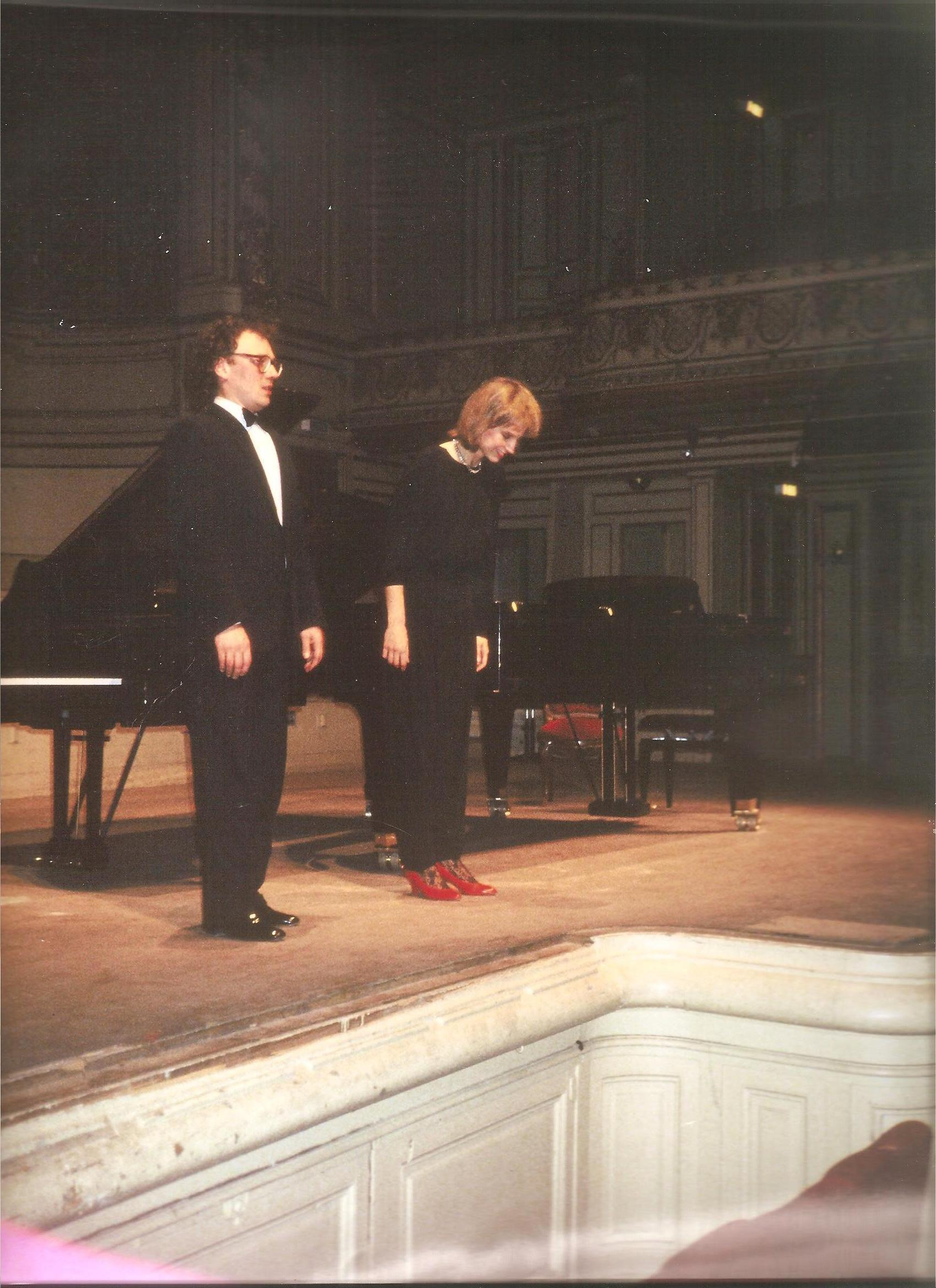 concert salle Gaveau Bruno PELTRE- Hélène MERCIER coproduction avec le Centre Culturel Canadien 1988